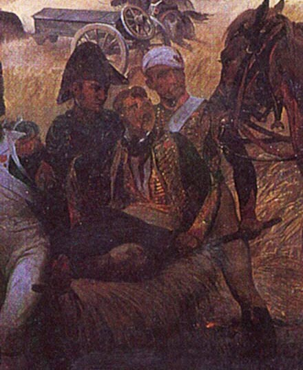 한국어 (조선): POrtrait d'Hercule Corbineau, détail du tableau d'Horace Vernet.